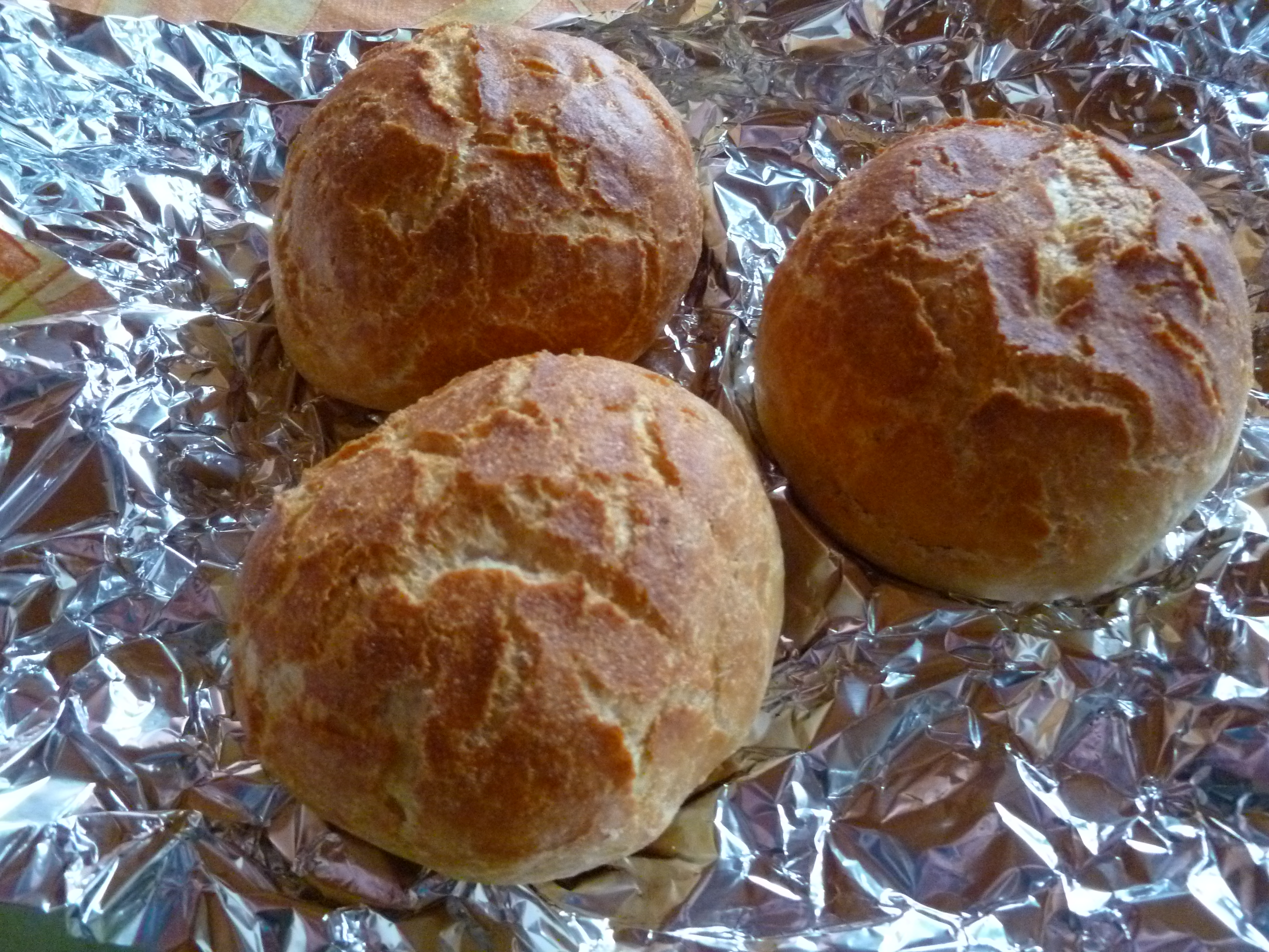 Springbrötchen